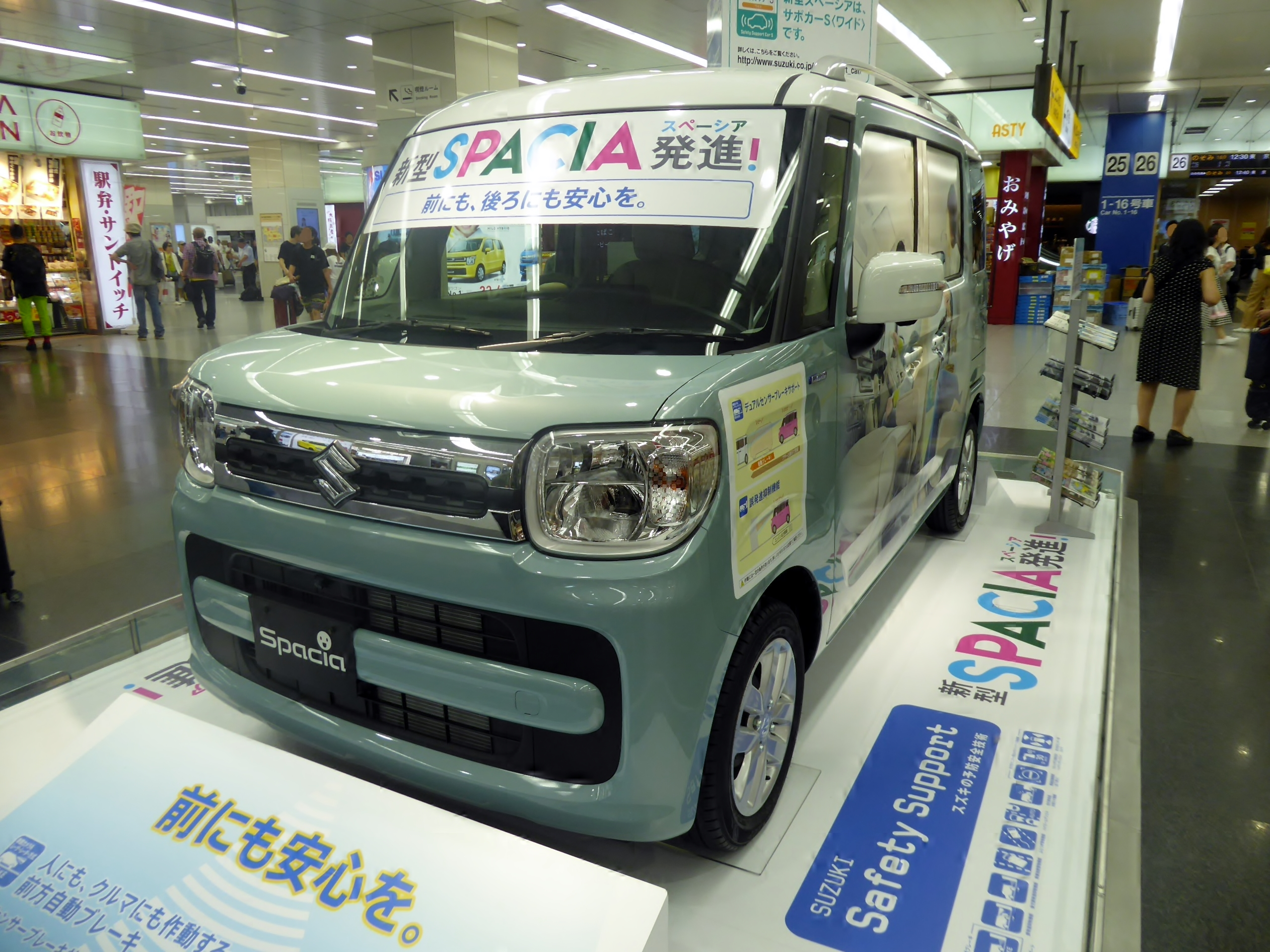 DAA-MK53S-ZBXB-JP型スズキ・スペーシアHYBRID X 2WDをフロントから撮影。